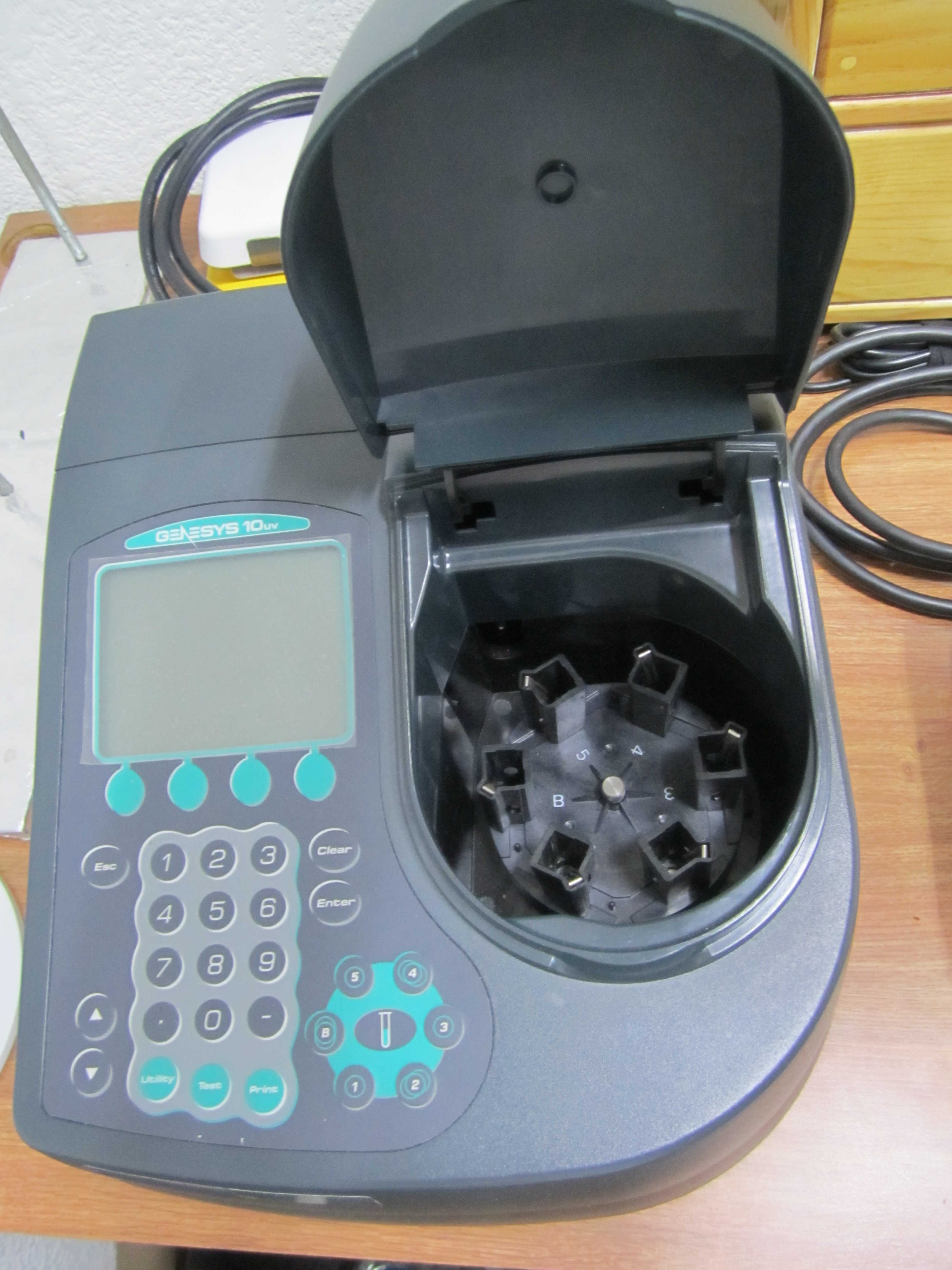 Porta cubeta dentro del espectrofotómetro